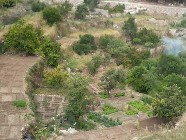 الطبيعة الجميلة في بتير